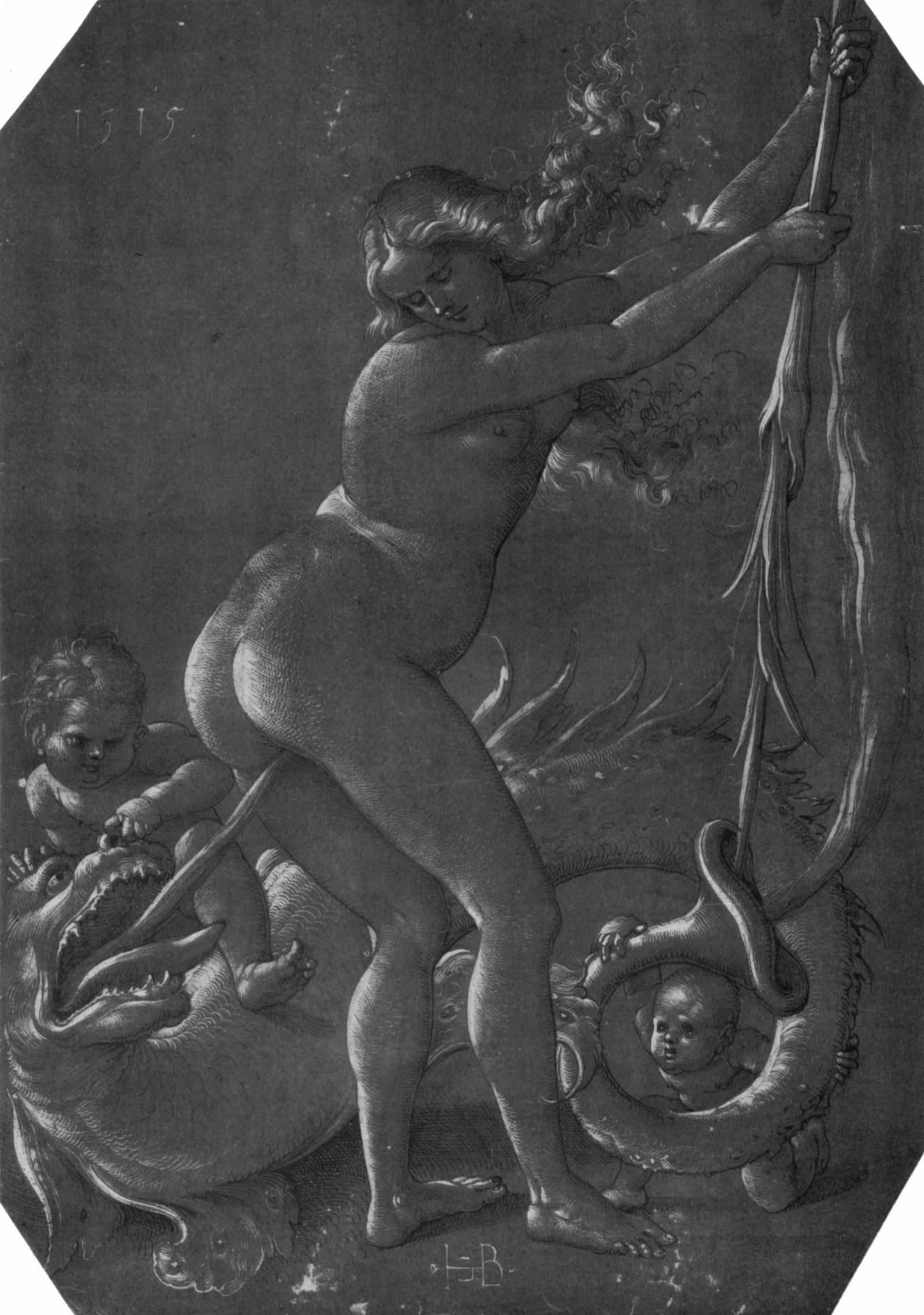 Stehende Hexe mit Ungeheuer; Feder, weiß gehöht, auf braun grundiertem Papier, 295 × 207 mm